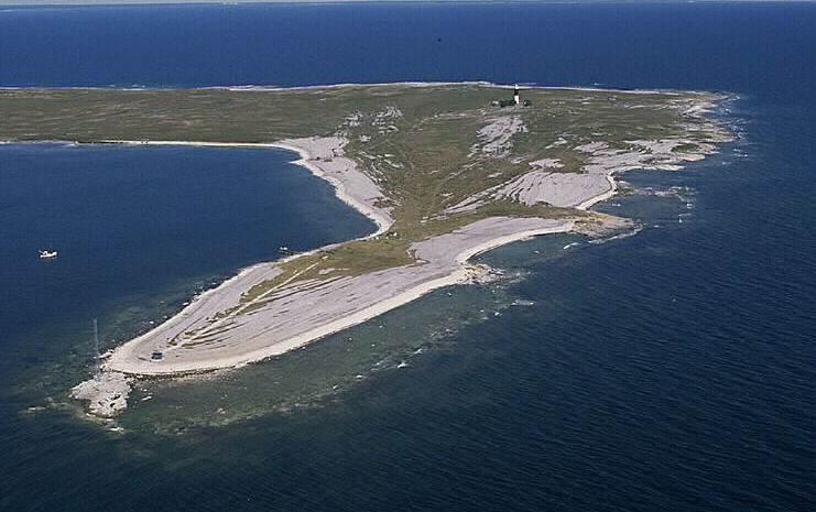 Motiv: Östergarnsholm Nyckelord: Flygbilder, Riksintressen Kategori: Kust- och skärgårdsmiljöÖstergarnsholm